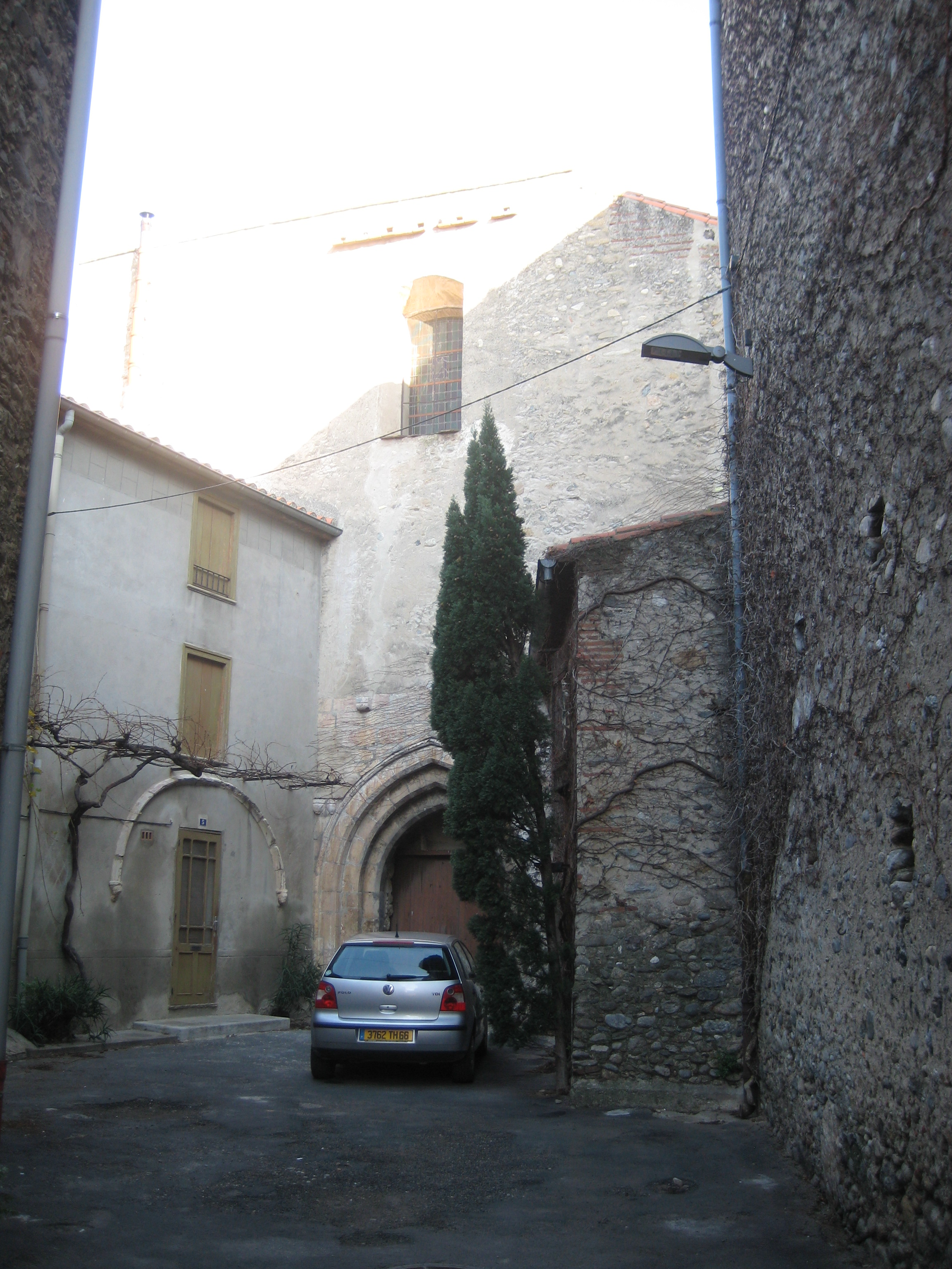 Église de la Rodona, Ille-sur-Têt